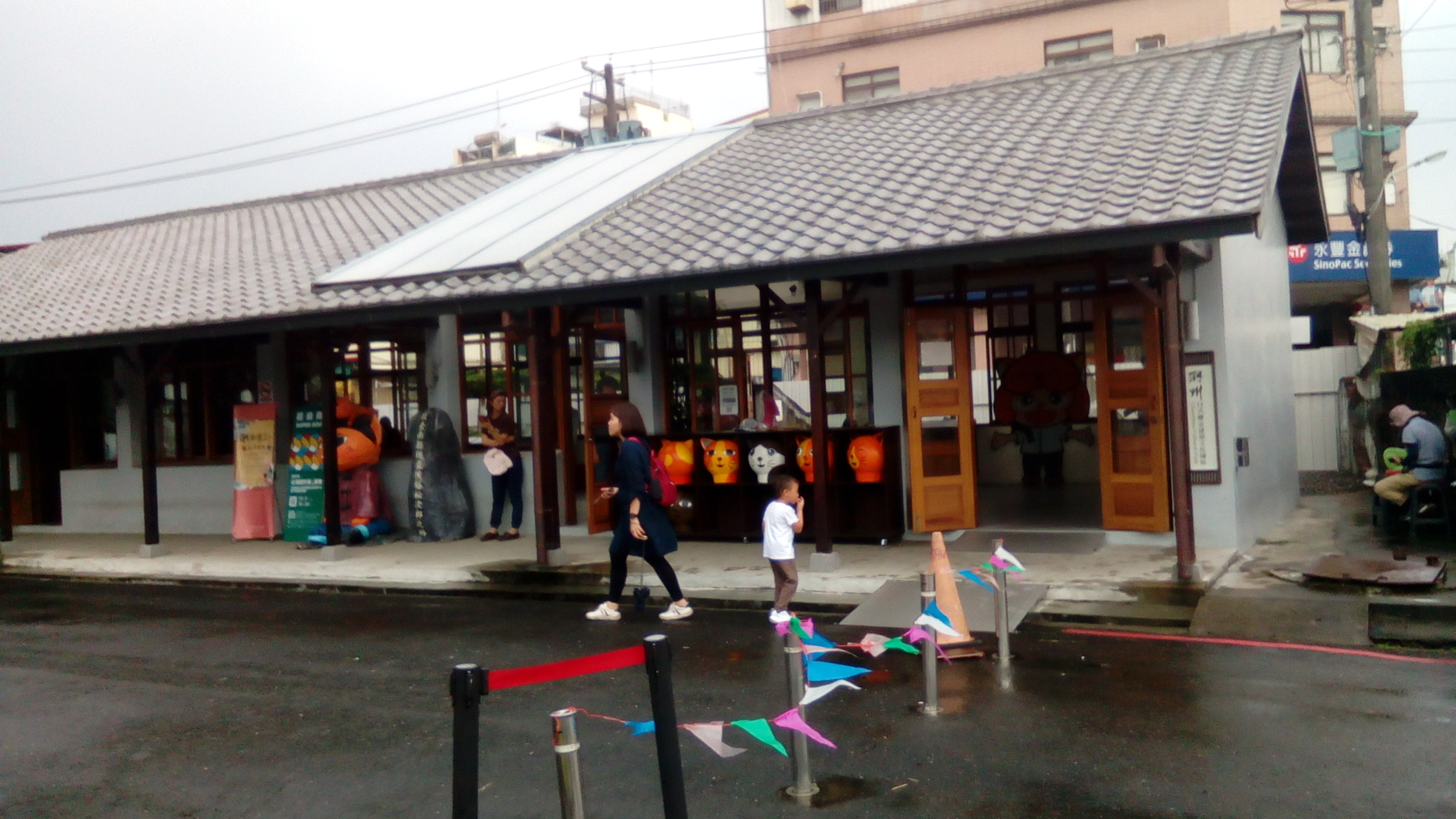 在延平路上 公有停車場旁 近圓環及冰店